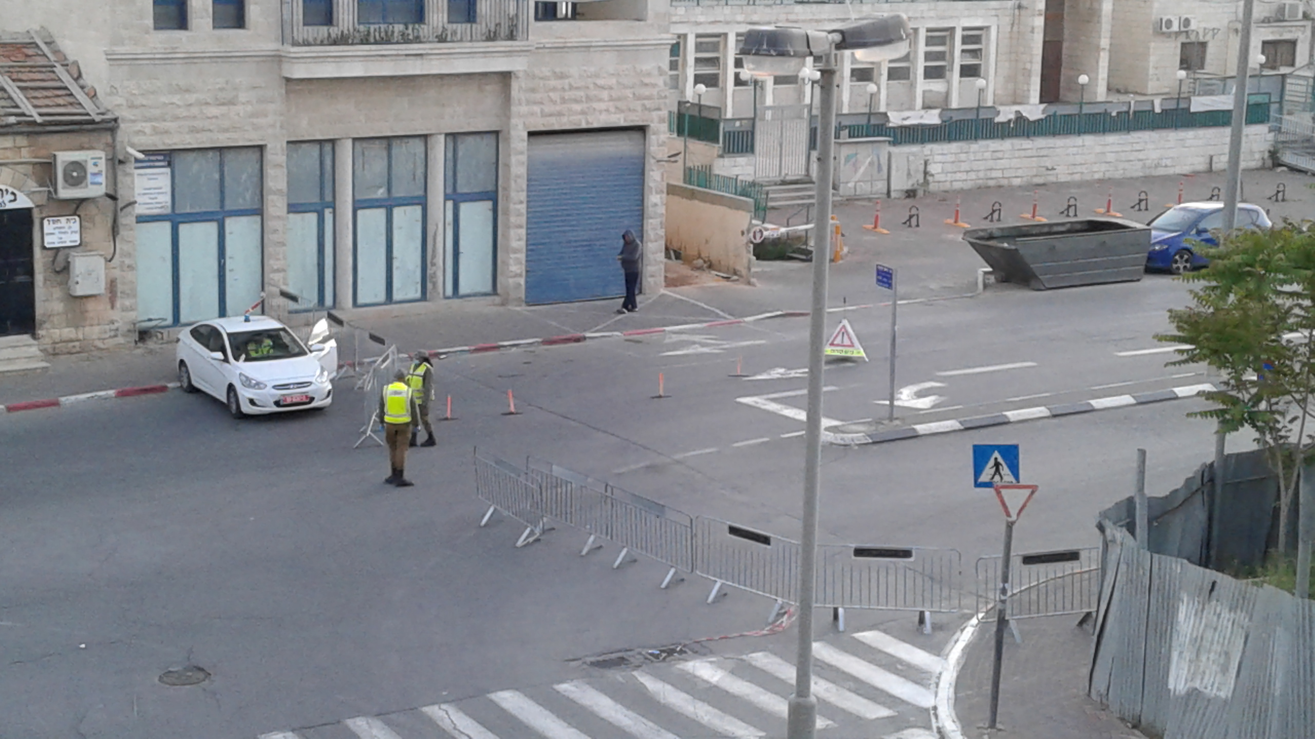 מחסום משטרה בירושלים ביום העצמאות ה-72 (2020), בו הוטל סגר כללי בכל המדינה בעקבות מגיפת הקורונה